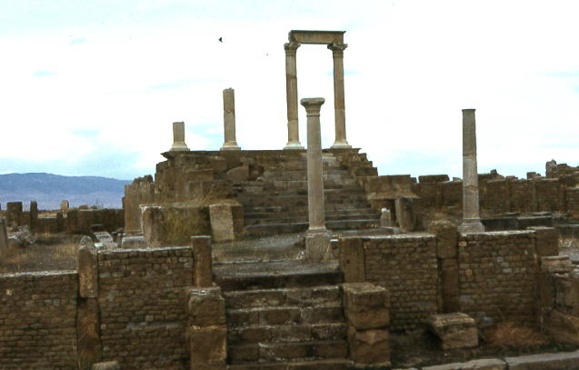 Ruines romaines de Timgad, Algérie